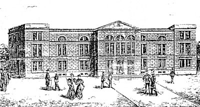 Gimnazjum Mariackie wybudowane na miejscu kościoła pw. NMP. Widok od południa, po 1884 r. wg M. Wehrmanna; za: K. Kalita-Skwirzyńska, 2003.